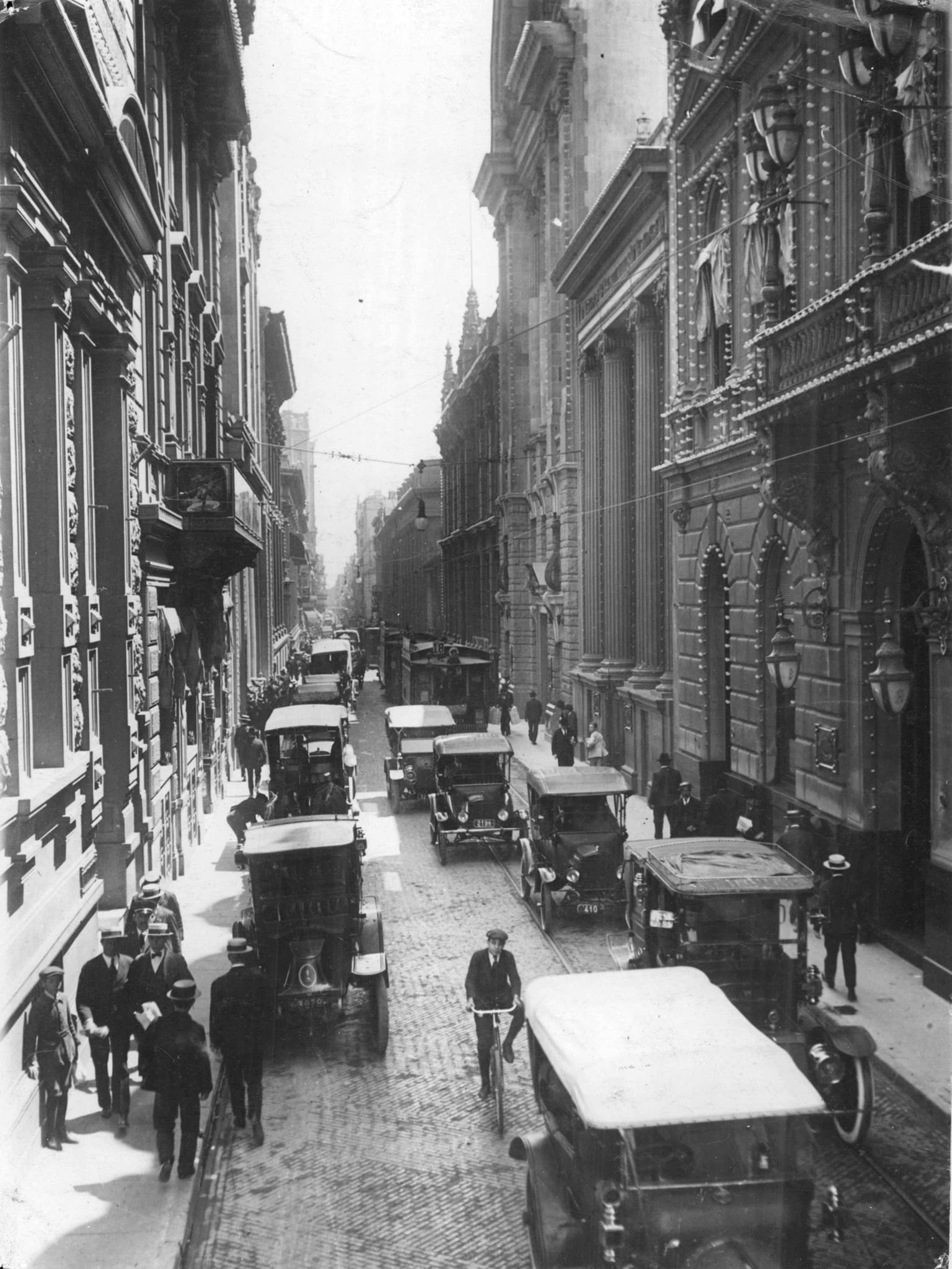 Vista de la calle Reconquista en Buenos Aires, tomada desde la calle Rivadavia mirando hacia el norte. A la derecha en primer plano, el primer edificio del Banco de la Nación, seguido por el Banco Germánico. Del lado izquierdo, en primer plano el Nuevo Banco Italiano.